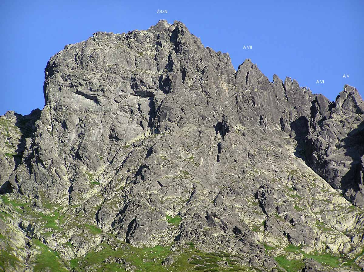 Żabi Szczyt Niżni ściana północno-zachodnia. A V, A VI i A VII to końcowe wierzchołki w grani Apostołów. Na lewo od Apostoła VII znajduje się Apostolska Szczerbina. Jestem autorem tego zdjęcia - Andrzej Makarczuk.